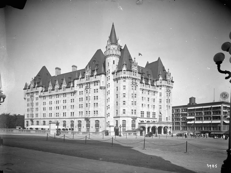 Chateau Laurier